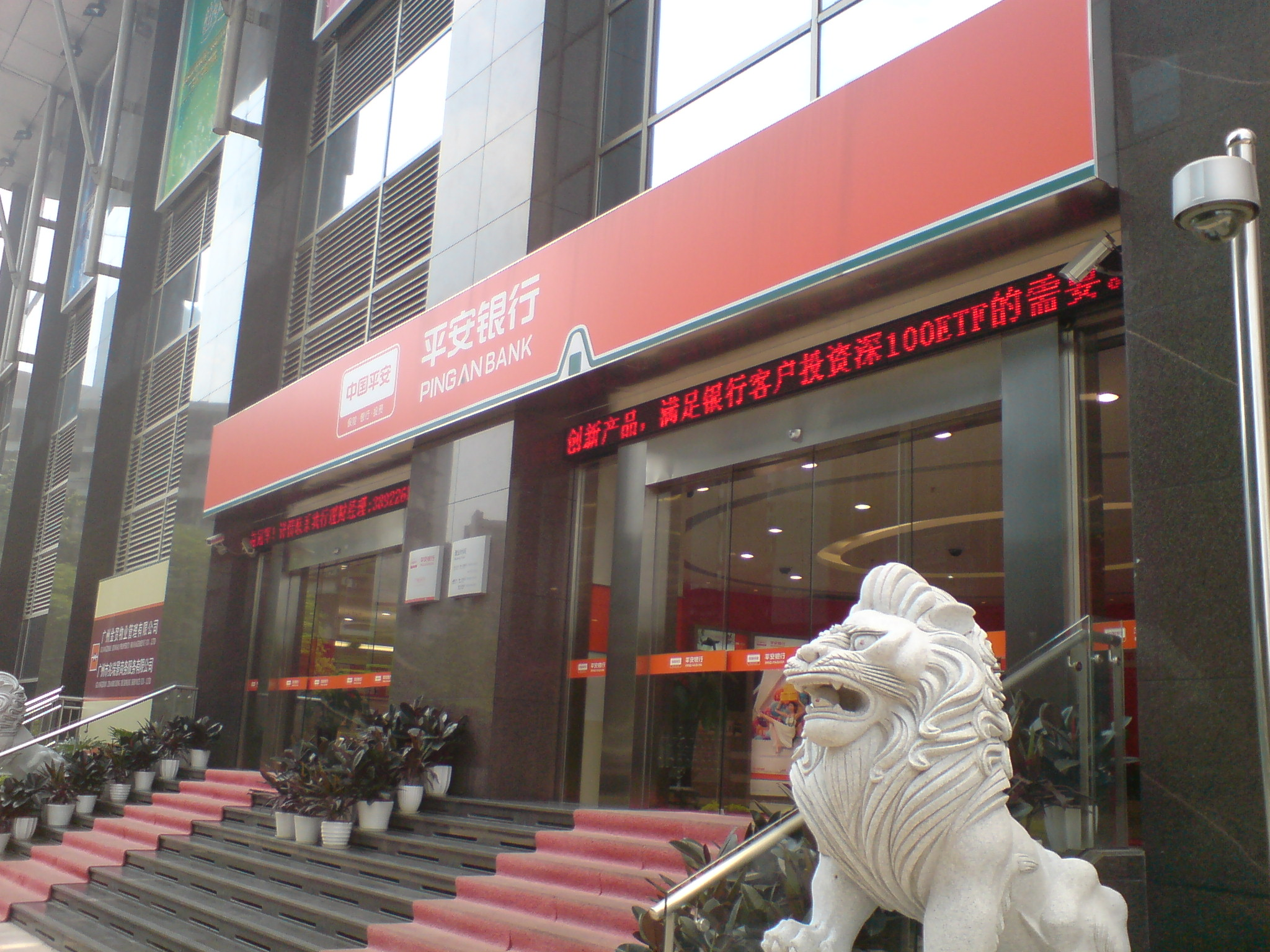 中文（中国大陆）: 平安银行广州分行